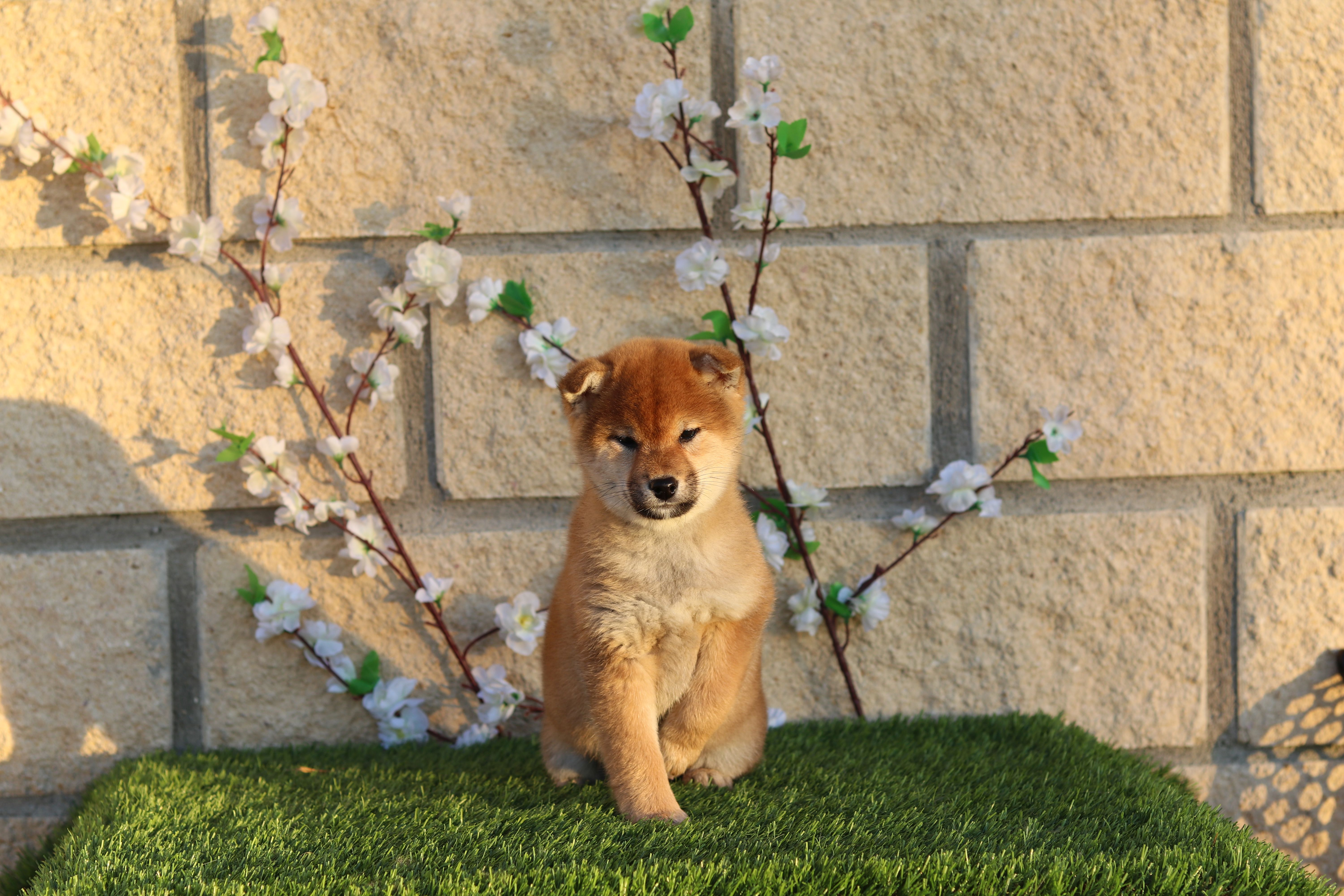 Cachorro de Shiba de 2 meses de edad macho del criadero Shun'You Kensha